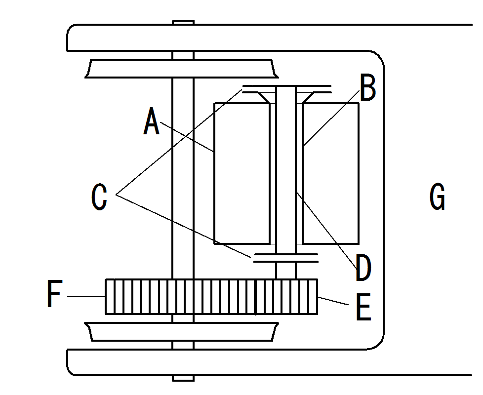 中空軸平行カルダン駆動方式を上から見たモデル図。 Aモーター（台車枠に固定）、B中空軸、Cたわみ板継手、Dねじり軸、E小歯車、F大歯車、 G台車枠。